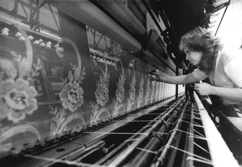 ADN-ZB-Thieme 20.1.1989 ,Bez. Karl-Marx-Stadt: Leistungsanstieg. Unter den geschickten Händen von Automatenstickerin Ines Höseler entstehen im VEB Plauener Spitze hochwertige Gardinen. Seit 1985 hat der Betrieb die Jahresproduktion konfektionierter Gardinen auf zwei Millionen Quadratmeter erhöht und damit verzehnfacht. Das wurde möglich durch die Konzentration der Konfektion, durch neue Zuschneideverfahren und die Teilautomatisierung bzw. Verkettung von Nähprozessen. In diesem Jahr wollen die Werktätigen des vogtländischen Betriebes Spitzen, Stickereien und konfektionierte Gardinen für eine Million Mark über den Plan anbieten.